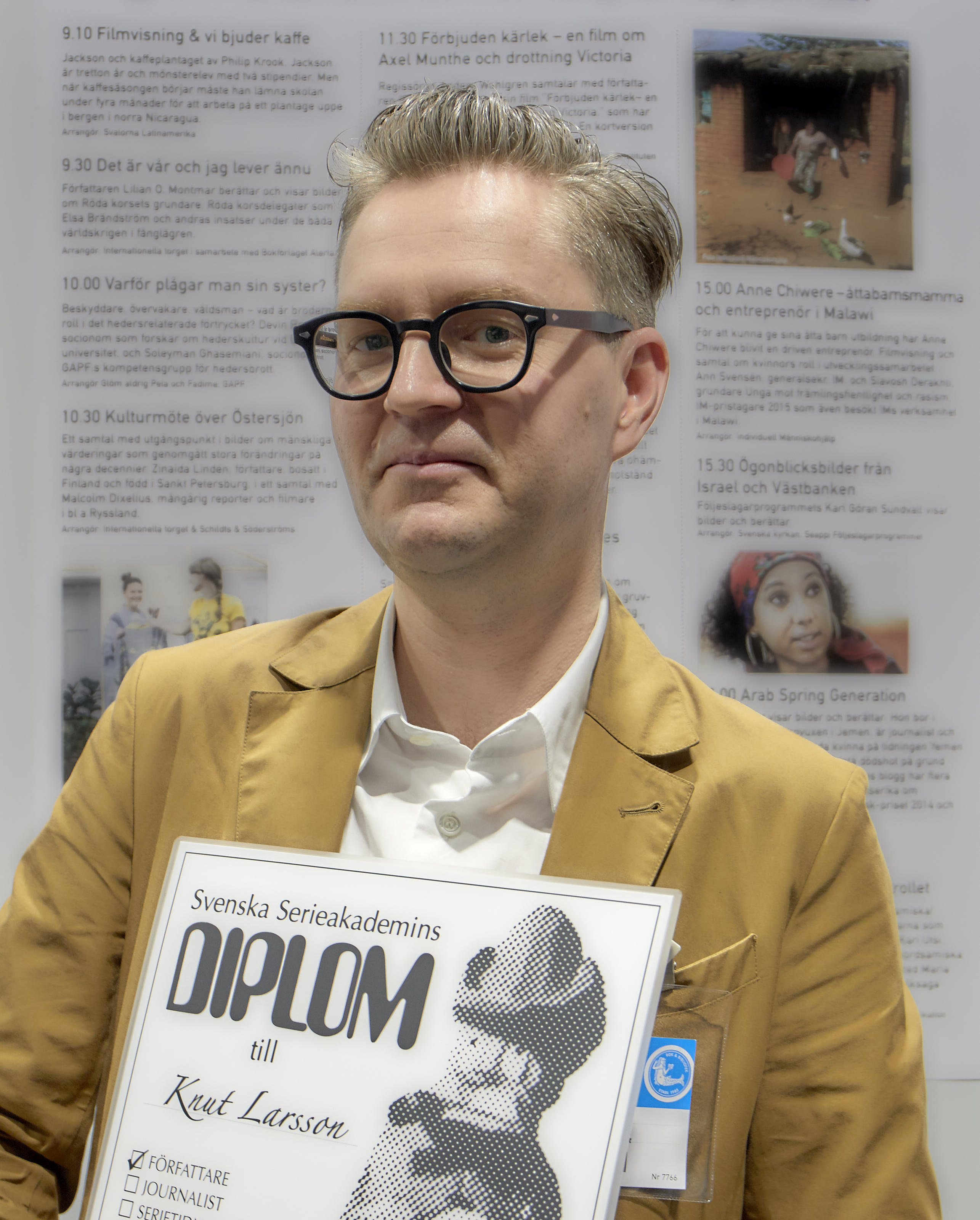 Knut Larsson på Bokmässan i Göteborg 2016, med det diplom som han fått som nybliven mottagare av Adamsonstatyetten.